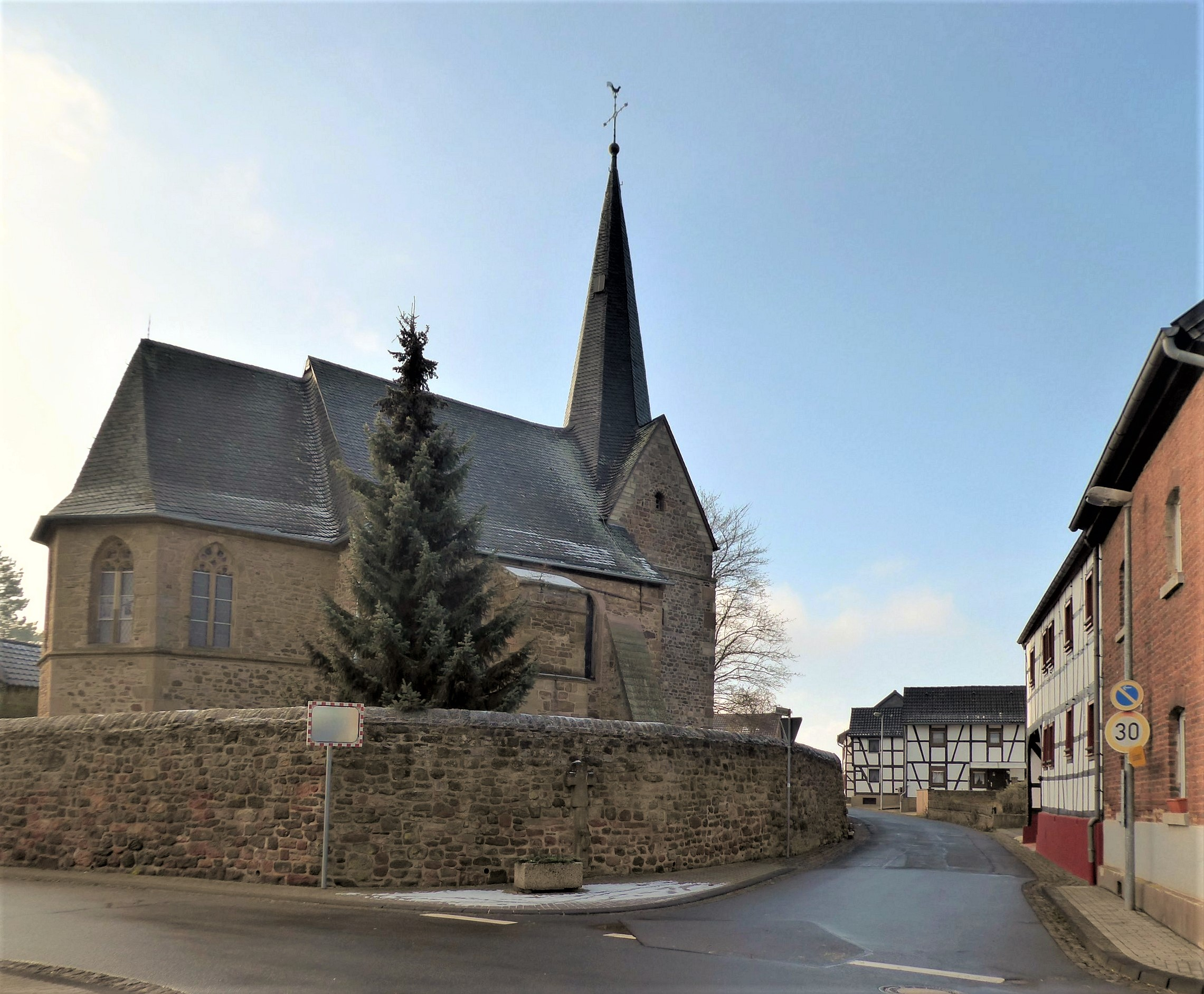 Zu den heiligen Mauren (Hostel)